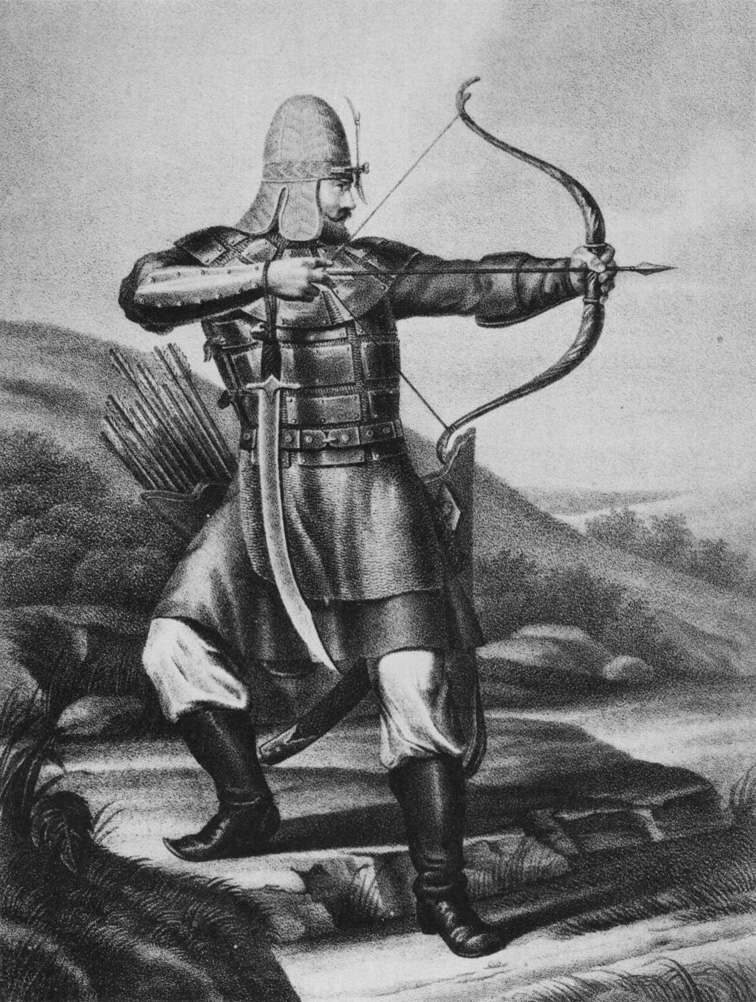 Русское вооружение с XIV до второй половины XVII столетия. Ратник в колонтаре с бармицей и шапке бумажной.